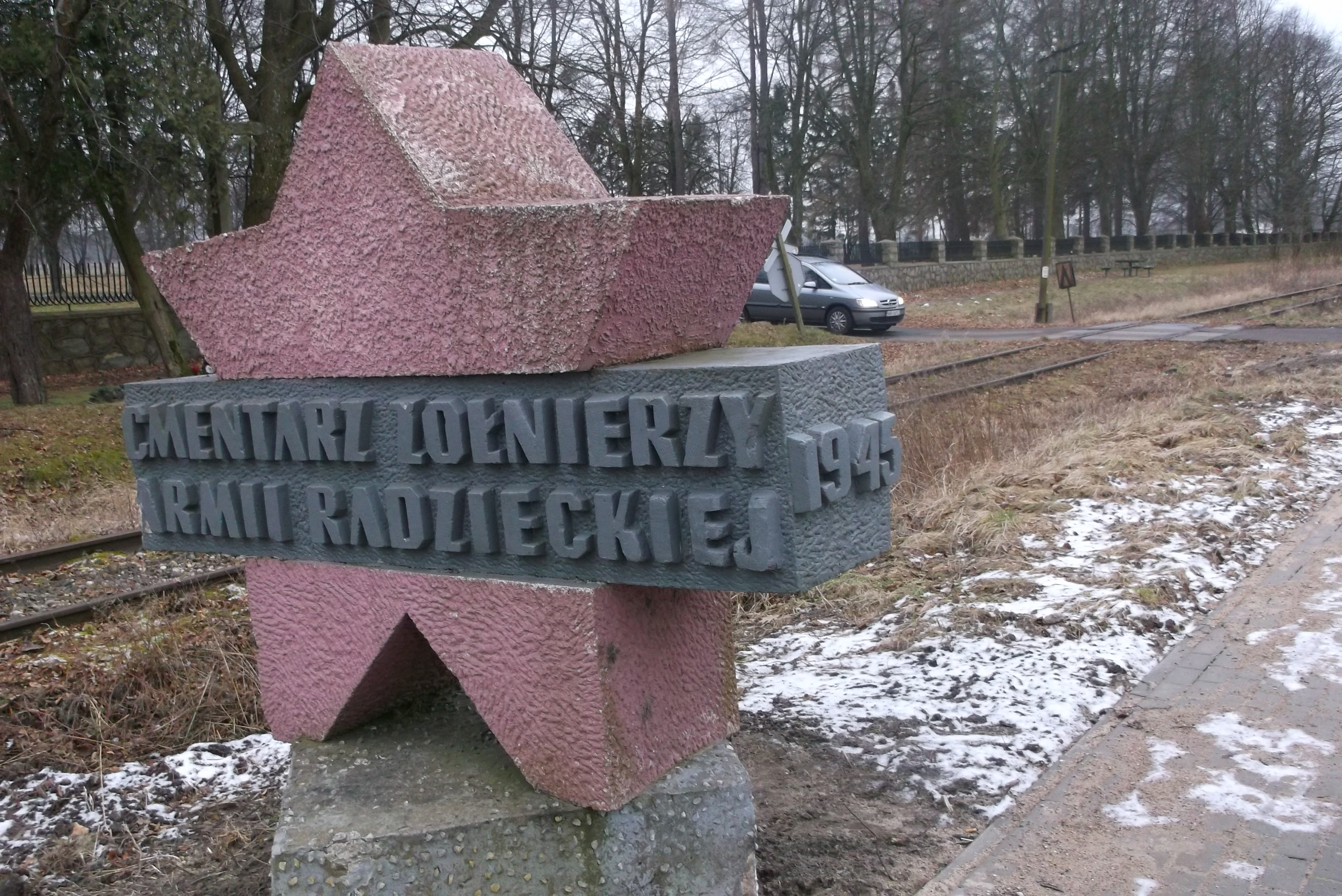 Cmentarz wojenny żołnierzy w Braniewie, druga wojna światowa